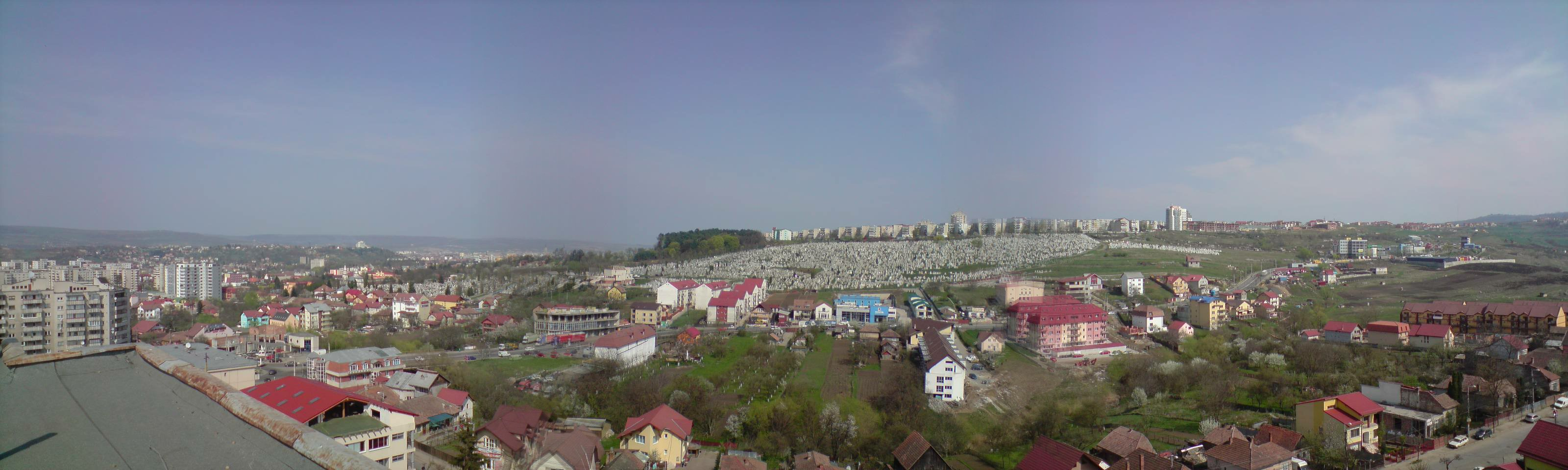 Kolozsmonostori Panoráma